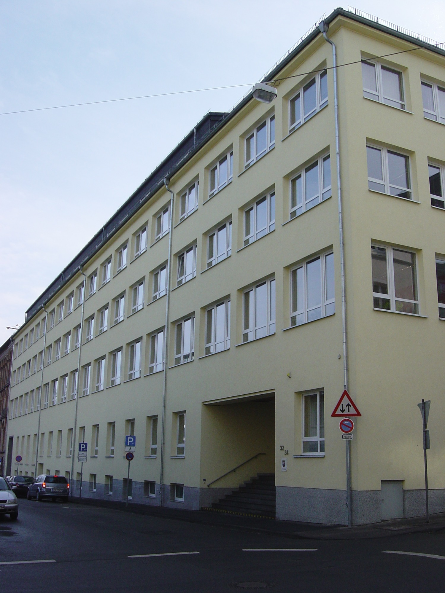 Amtsgericht Kassel Außenstelle Friedrichsstraße 32-34 (Ecke Obere Karlsstraße) in Kassel